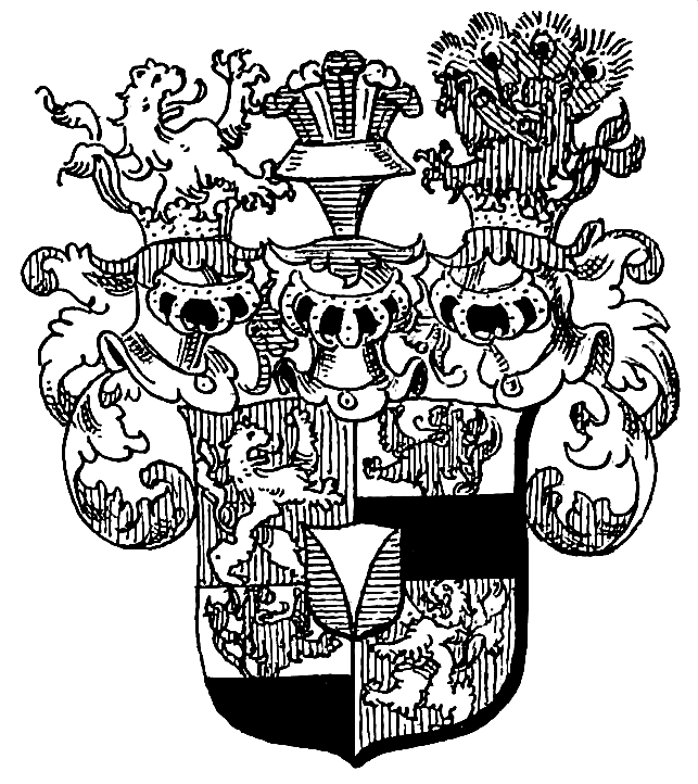 Wappen Liechtenstein-Castelcorn 1506